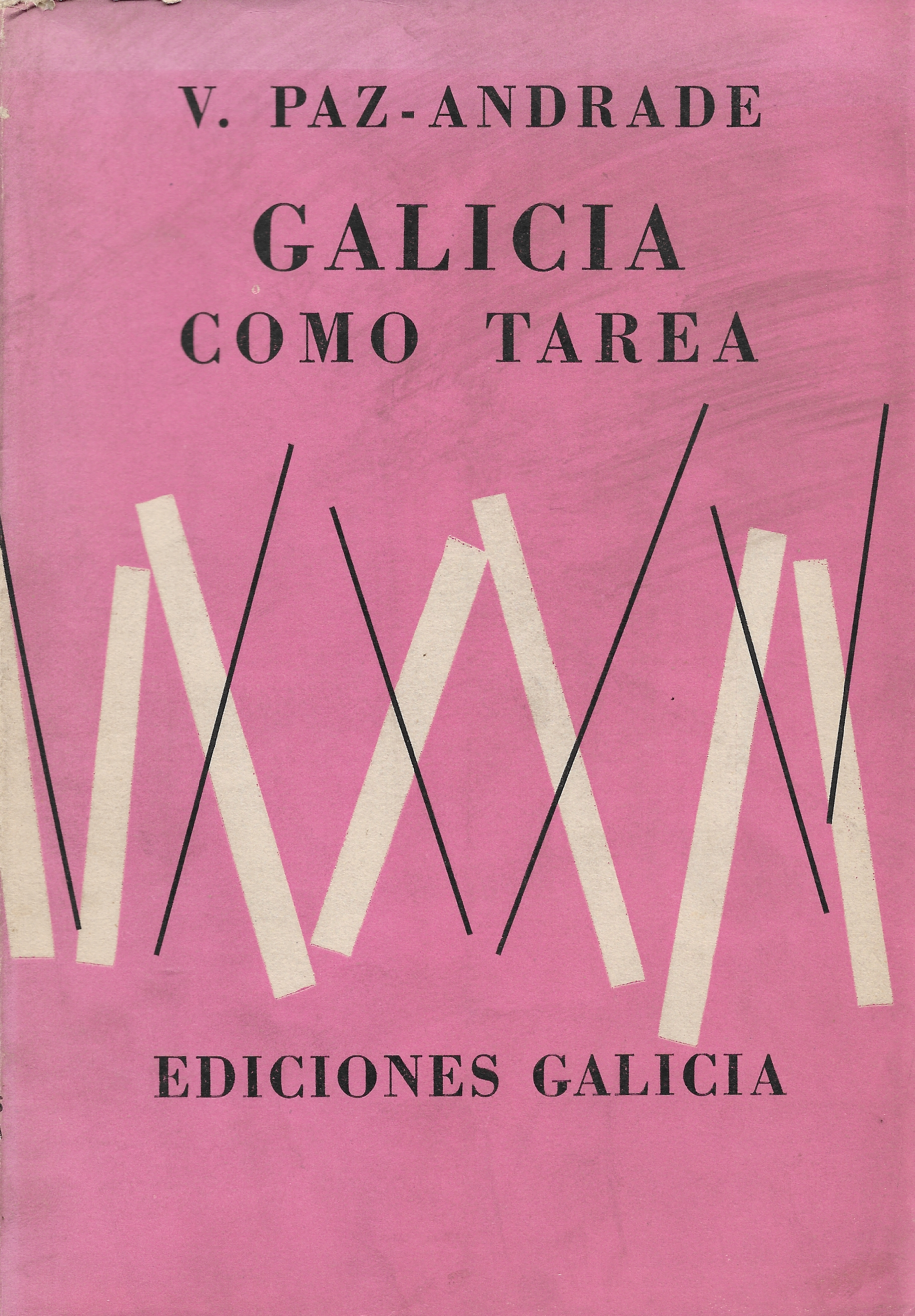 Portada da primeira edición do ensaio 'Galicia como tarea' de Valentín Paz-Andrade (1959)